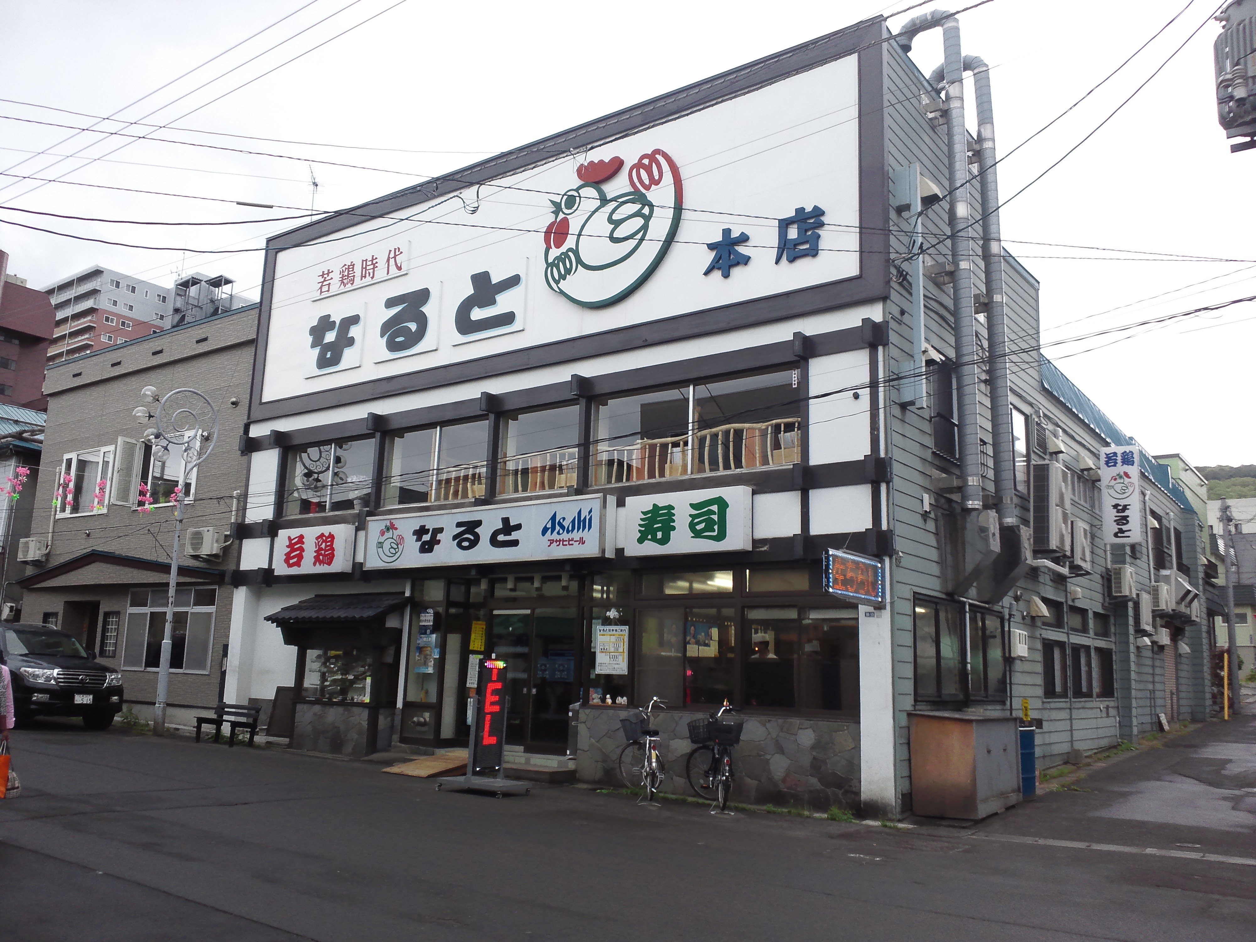 若鶏時代なると 本店 北海道小樽市に所在する飲食店